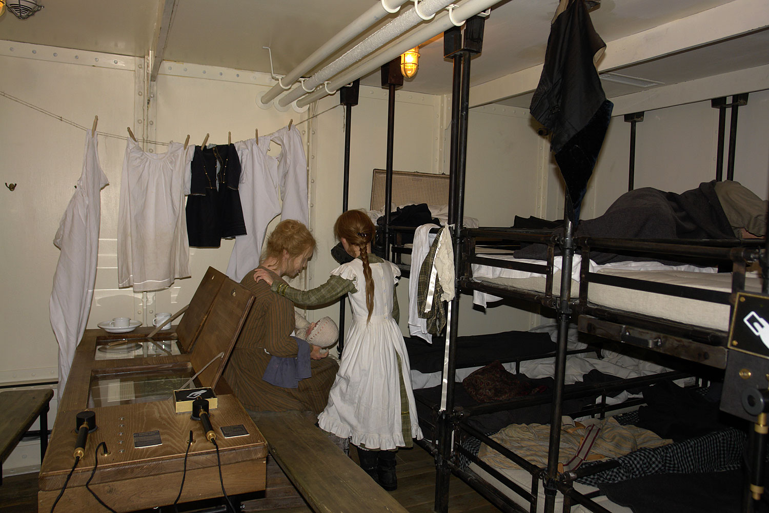 Museum Bremerhaven: German Emigration Center Native nameDeutsches AuswandererhausLocationColumbusstraße 6527568 Bremerhaven, Bremen GermanyCoordinates53° 32′ 43.08″ N, 8° 34′ 27.01″ E Established8 August 2005Web pageDeutsches AuswandererhausAuthority control : Q318809 VIAF: 131244556 LCCN: nr2005008075 GND: 16035841-3 SUDOC: 118763741 WorldCat institution QS:P195,Q318809